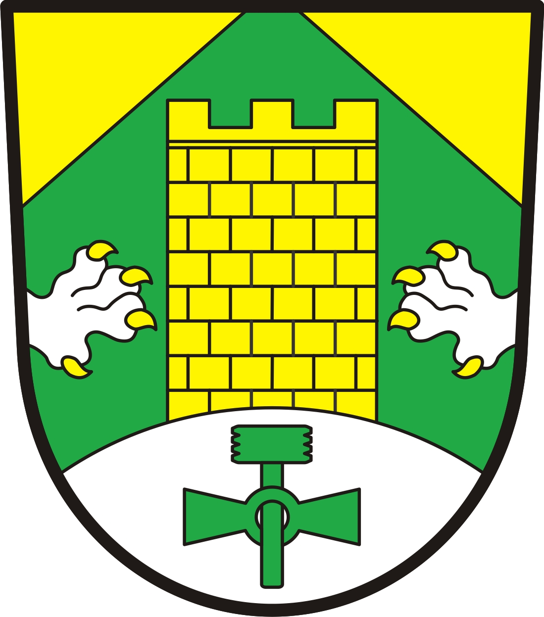 Znak obce Kouty, okres Havlíčkův Brod